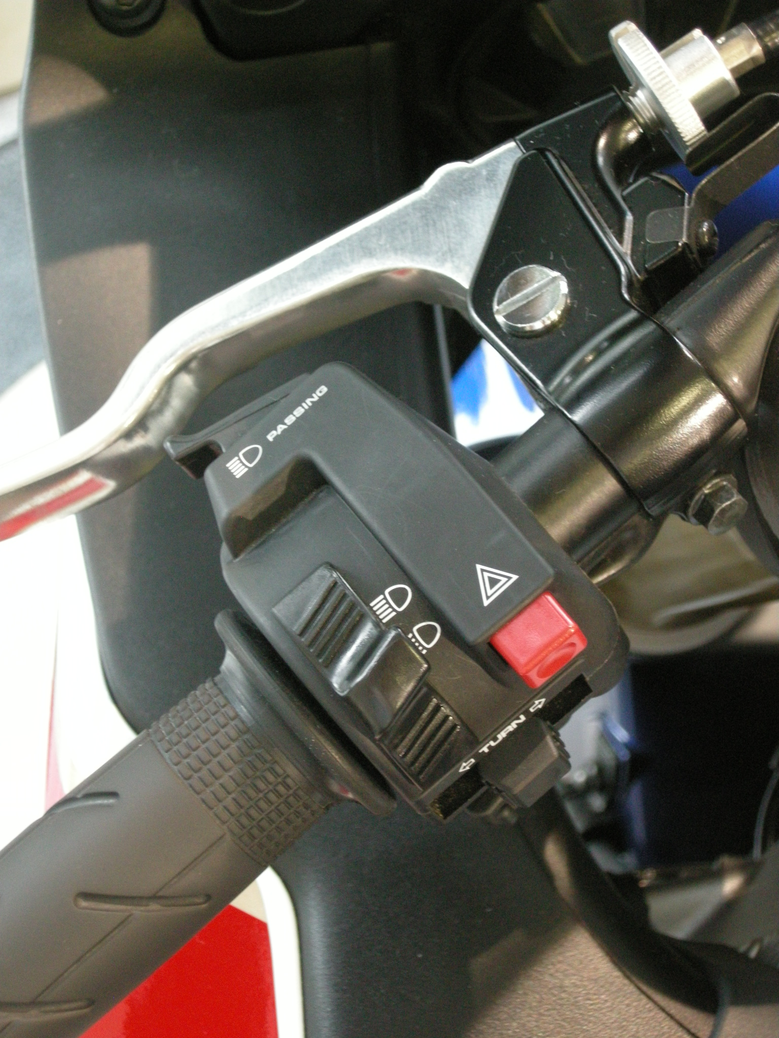 CBR1000RR（SC59）のハザードランプスイッチ